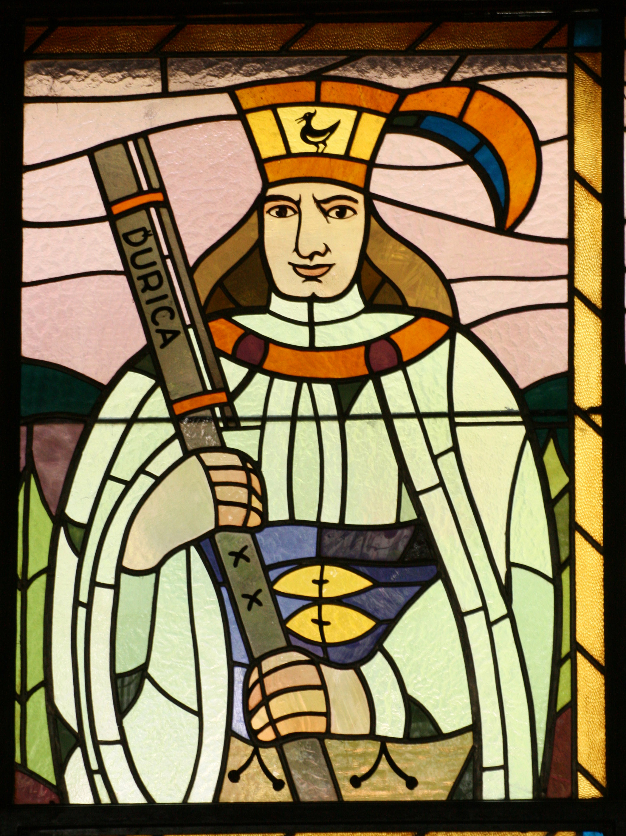 Autorom vitráže v interiéri PKO v Bratislave v roku 1957 bol národný umelec Janko Alexy